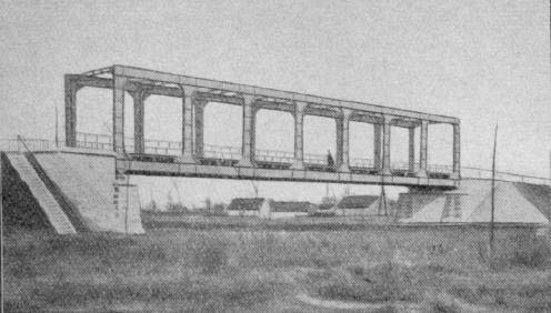 Eerste brug over de Schelde tussen Ruien (Kluisbergen in Oost-Vlaanderen) en Rugge (Avelgem in West-Vlaanderen) - Vlaanderen - België. De officiële opening had plaats op 9 september 1906, tijdens de Eerste Wereldoorlog werd ze verwoest.